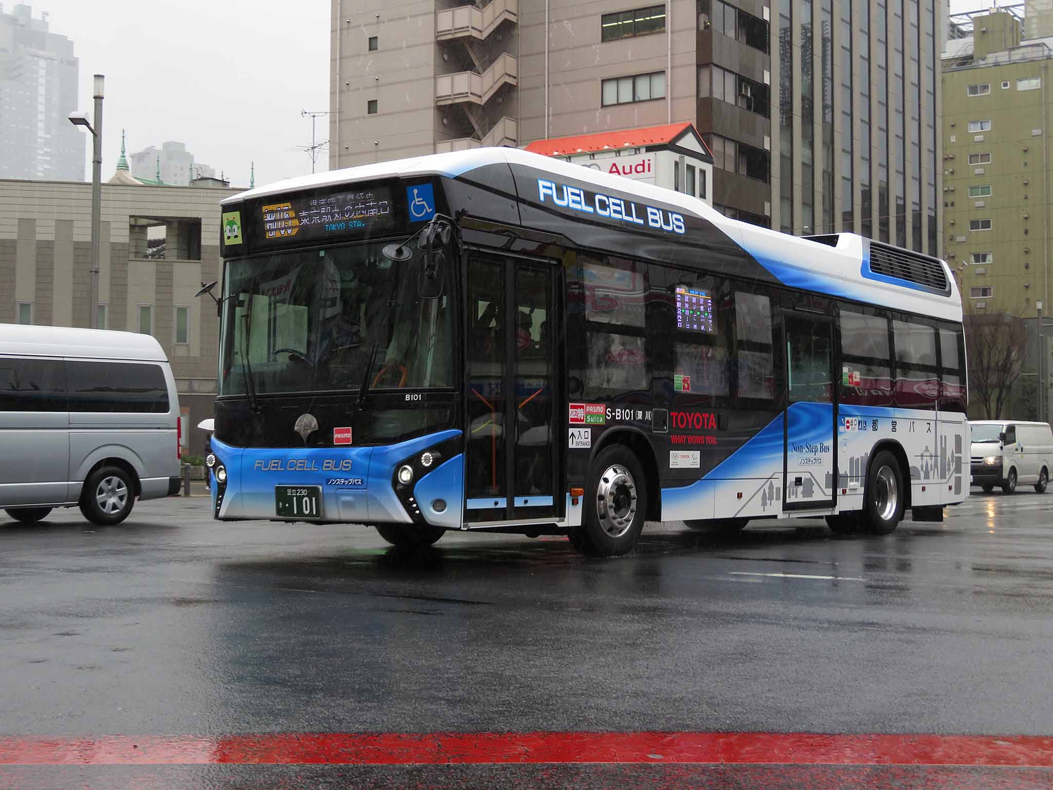 2017年より都営バスで営業運行を開始した燃料電池バス。2017年3月より東京駅～東京ビッグサイト間を銀座経由で運行する都05丙系統に就役する。 登録番号：足立230き・101 撮影地：東京都中央区築地